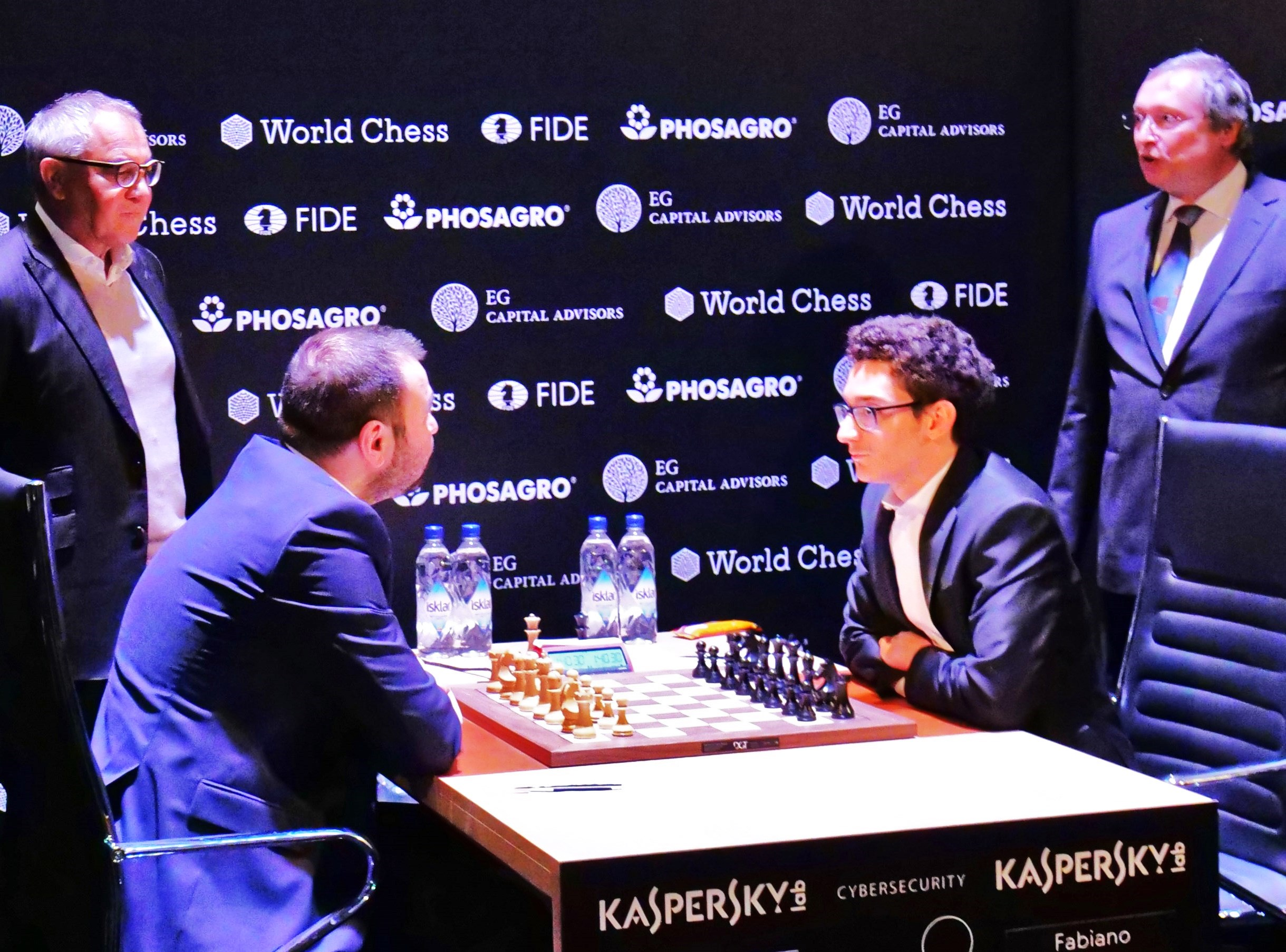 Caruana-Məmmədyarov, Magath und Deventer - Kandidatenturnier Berlin 2018 Runde 10